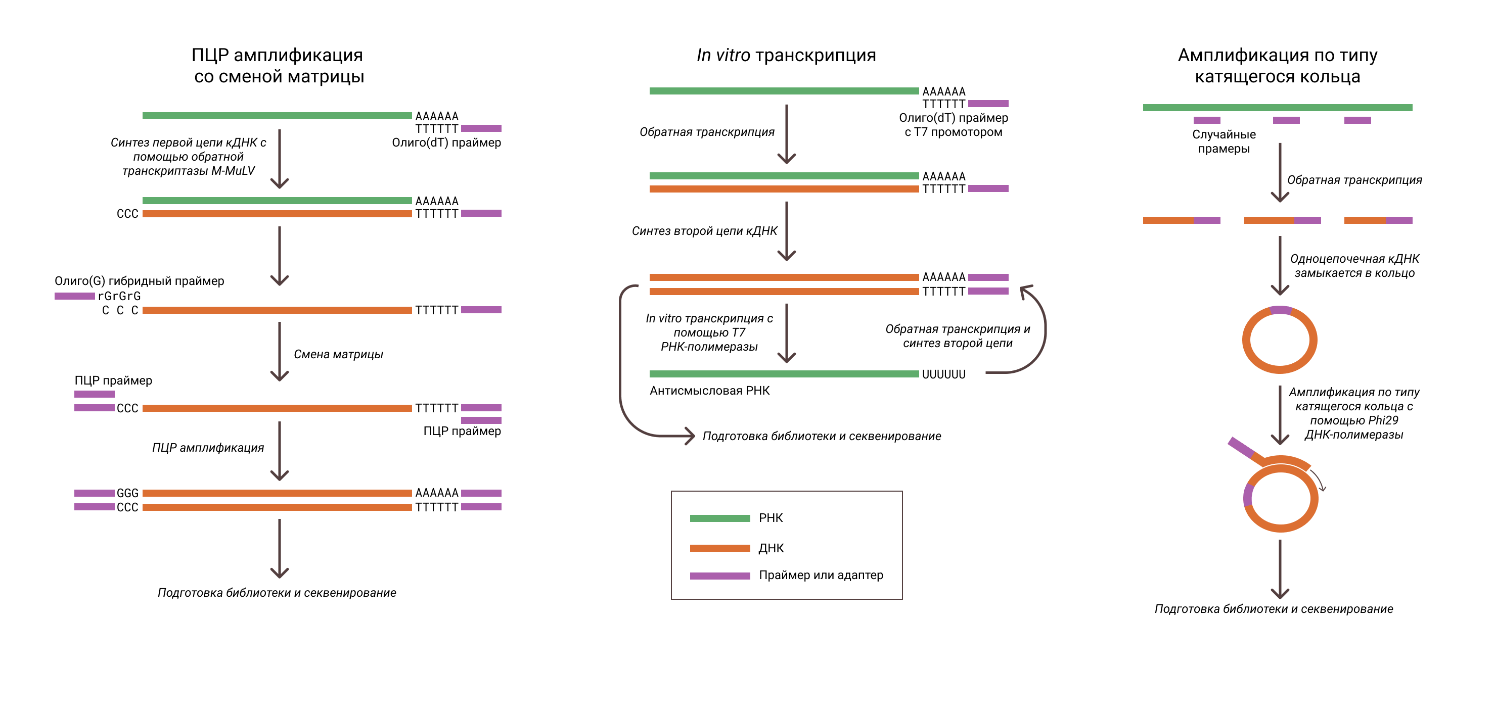 Методы подготовки библиотек для секвенирования РНК единичных клеток. Представлены схемы методов: ПЦР амплификация со сменой матрицы, in vitro транскрипция, амплификация по типу катящегося кольца.